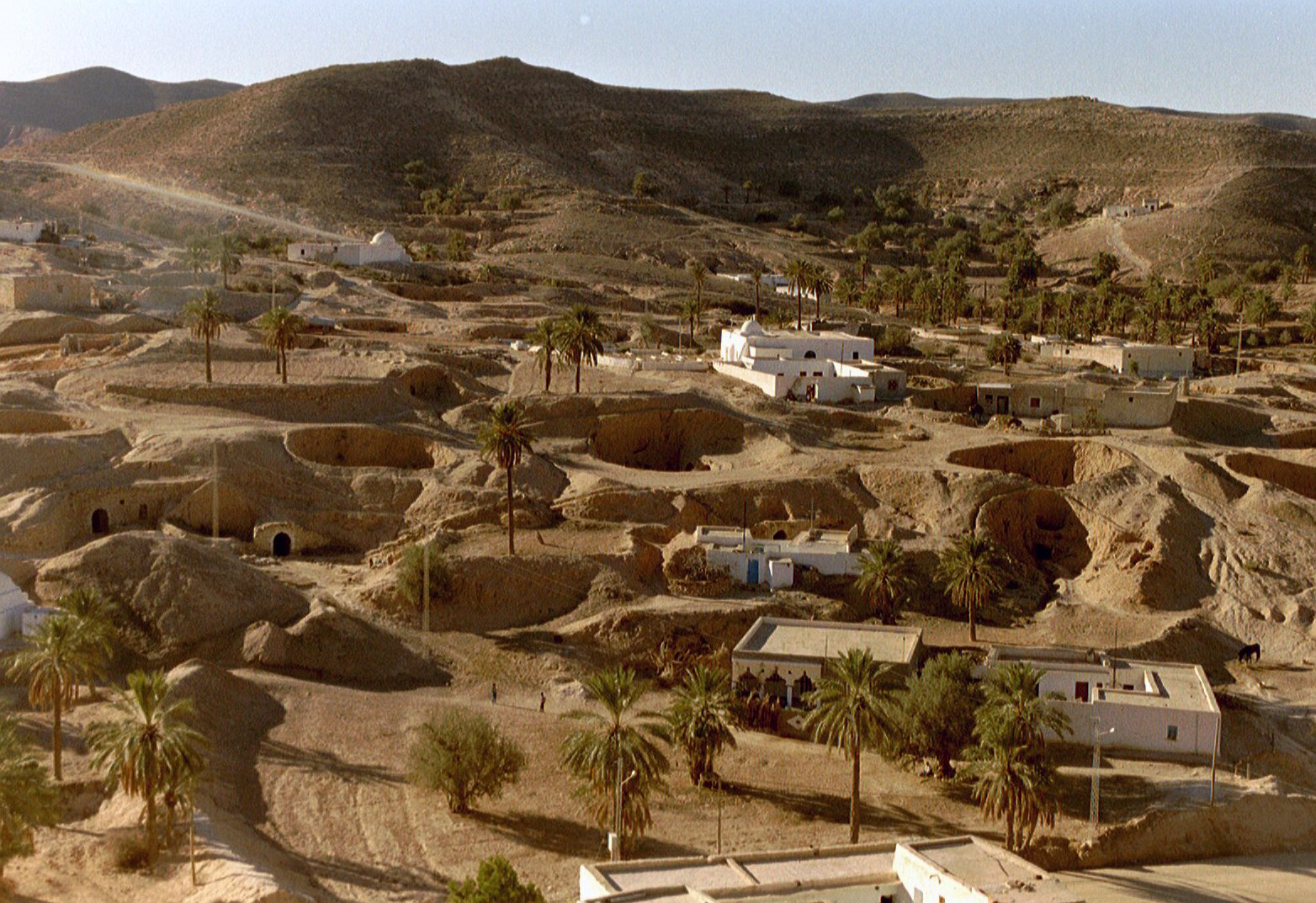 Matmata